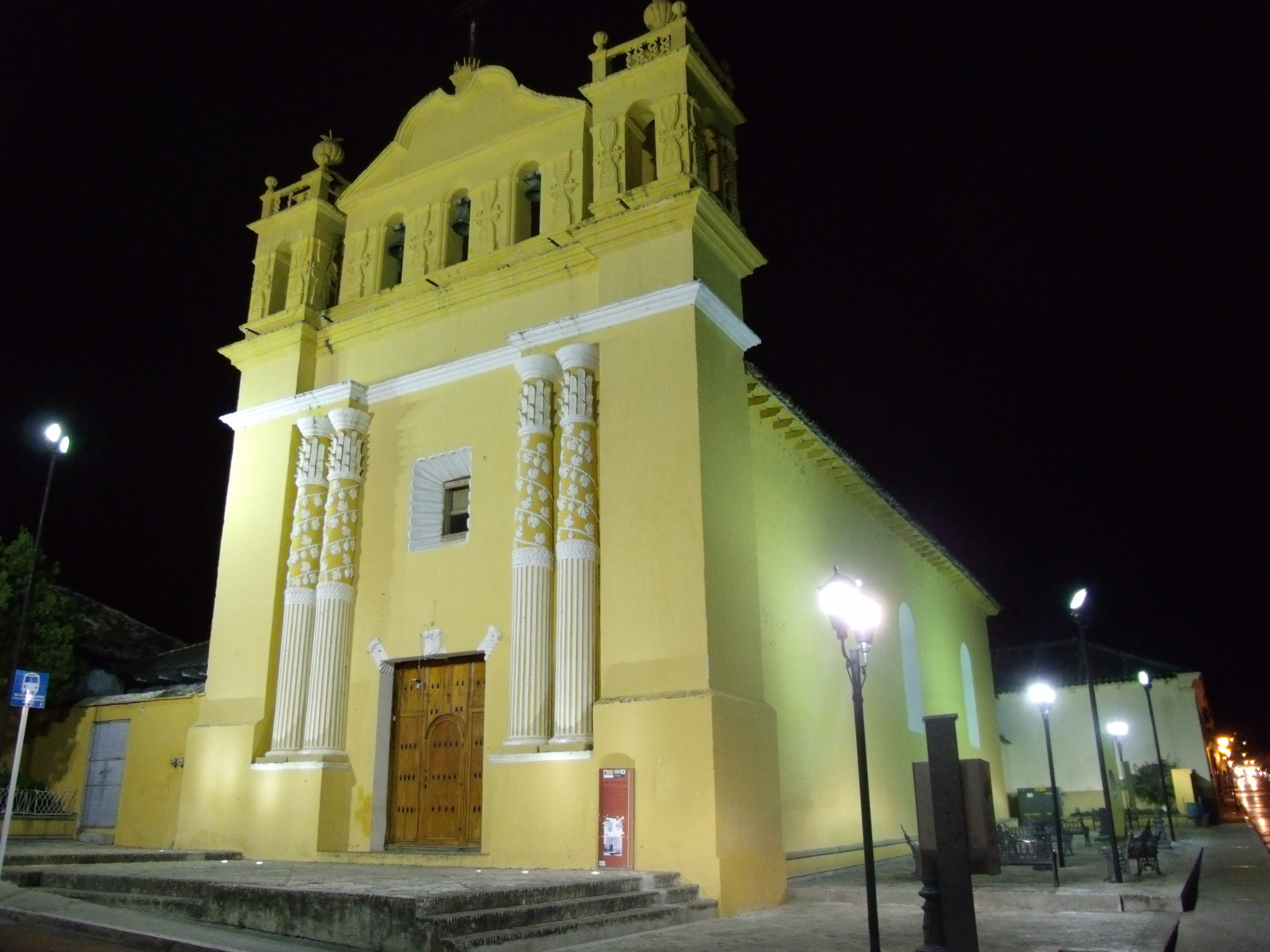 iglesia del calvario